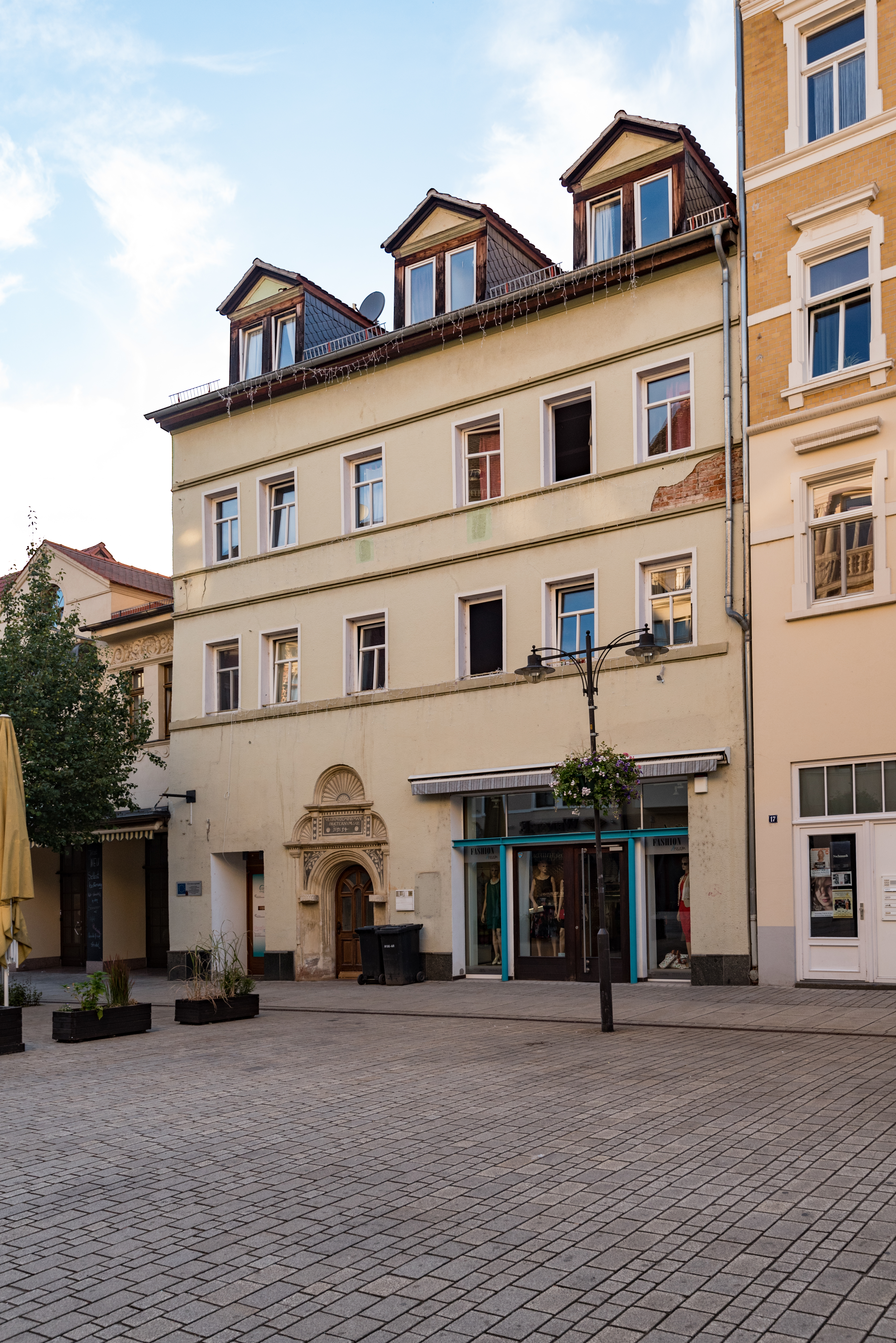 Weißenfels, Jüdenstraße 19